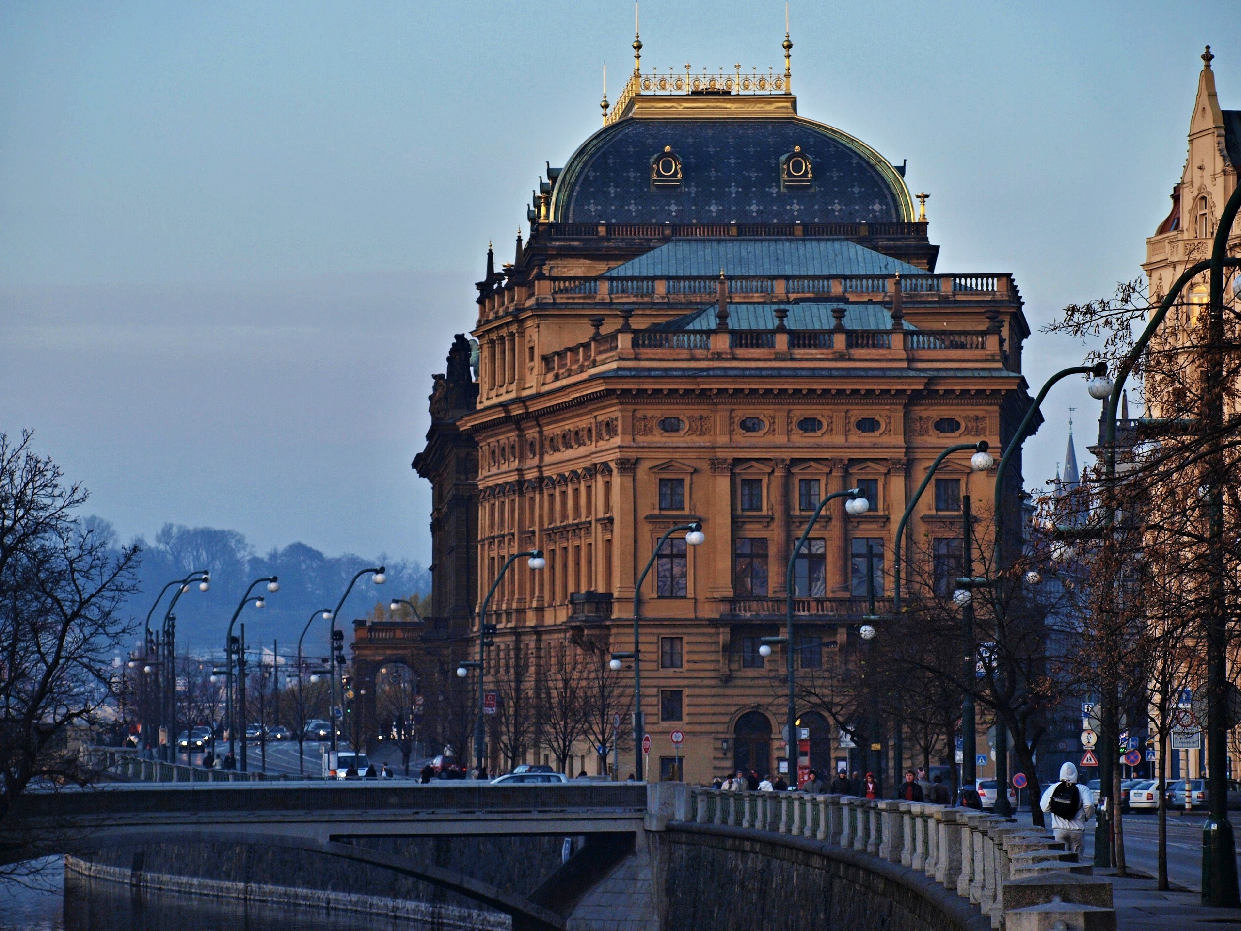 Národní divadlo v Praze